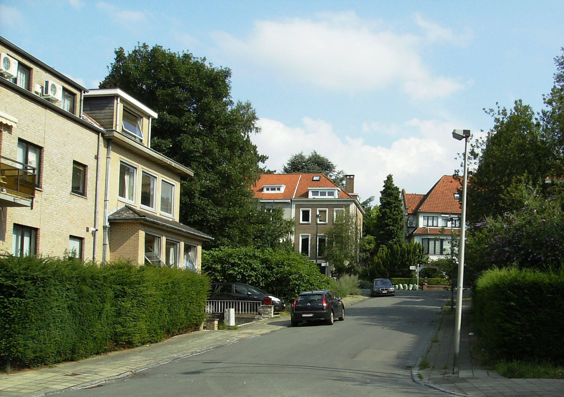 avenue des Linottes Auderghem Belgium